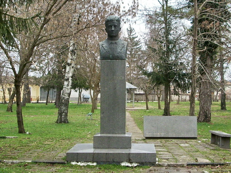 Село Кардам, община Попово. Паметникът на Ст. Кочев и паметната плоча на загиналите от селото войници в парка.